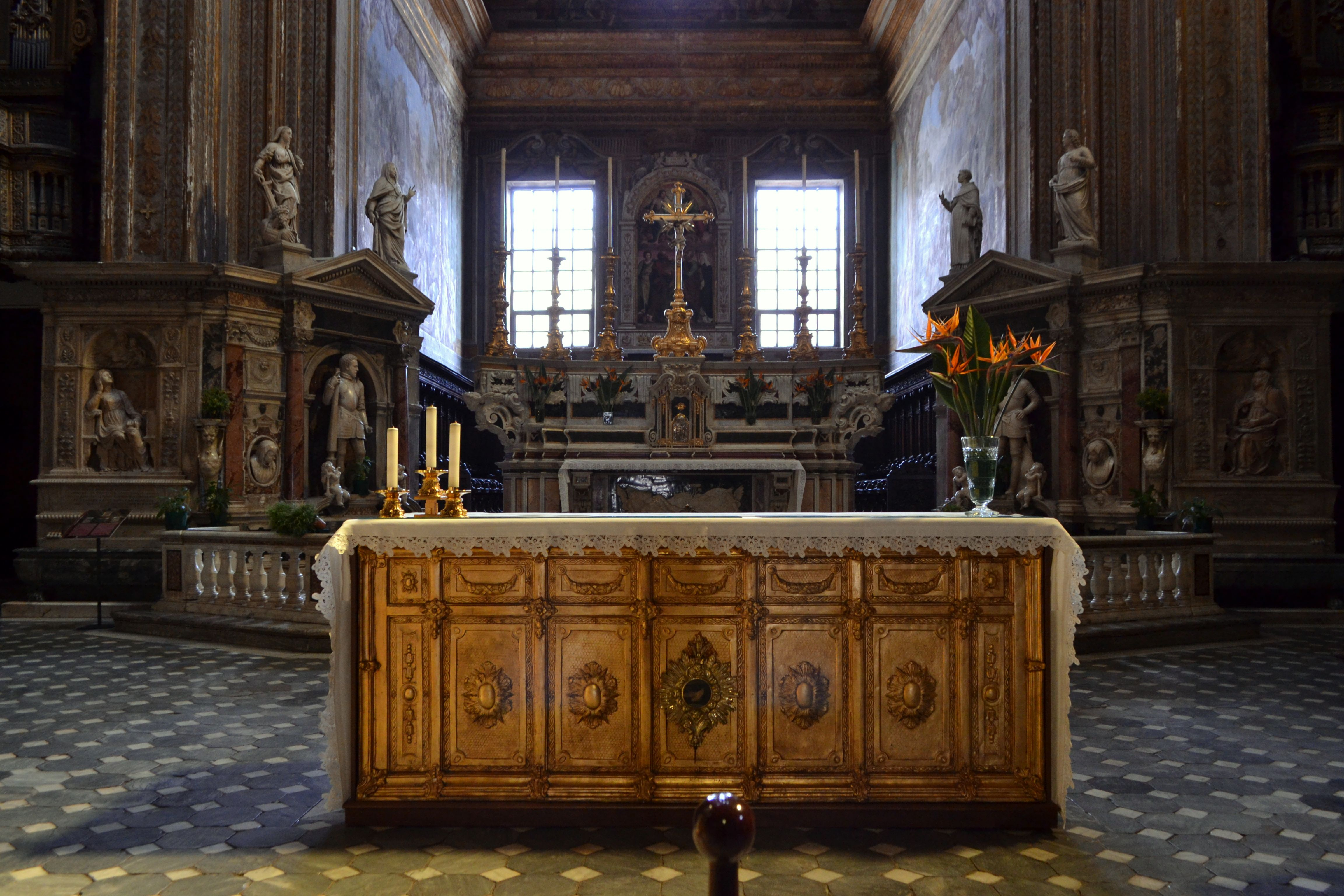 Chiesa di Santa Caterina a Formiello di Napoli - Presbiterio (o cappella Spinelli di Cariati)